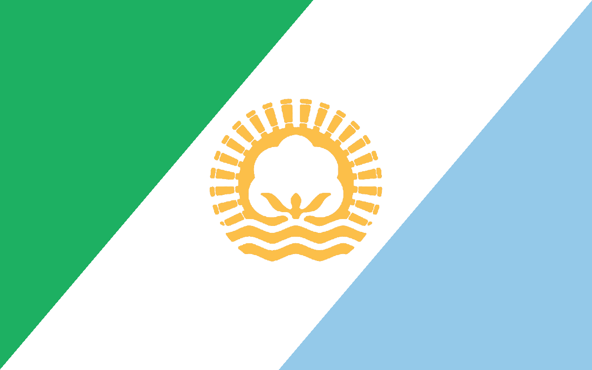 Bandera oficial de la localidad de Presidencia Roque Sáenz Peña, Chaco, Argentina. Puesta en vigencia desde el día 1 de marzo de 2013. Diseñada por Roy Pablo Milán, la bandera se componen de tres franjas diagonales color verde, blanco y azul celeste (representando el verde a los montes autóctonos y el azul celeste a las aguas termales) y en su centro un logotipo color dorado (compuesto por tres signos representativos de la historia de la ciudad: las vías del tren, el capullo de algodón y las líneas onduladas que representan a las aguas termales).